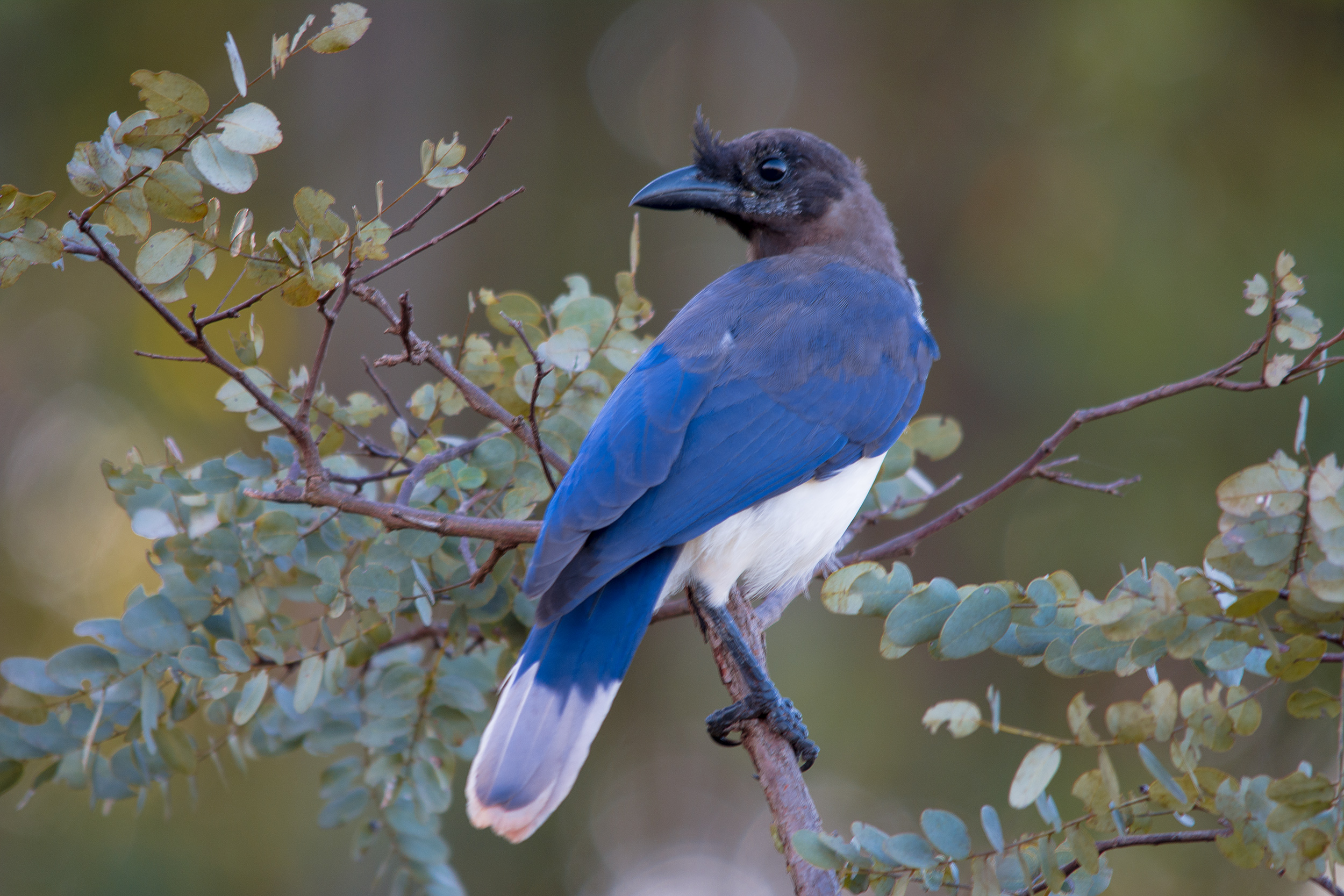 Registro feito na cidade de Ribas do Rio Pardo-MS. Existia um grupo de cerca de 5 indivíduos se alimentando à beira de uma estrada rural. É uma ave onívora. Vive em bandos. Vive nos cerrados. Típica da Região Centro-oeste, está presente também do Piauí, Maranhão e sul do Pará até Minas Gerais e São Paulo, Paraguai e Bolívia.